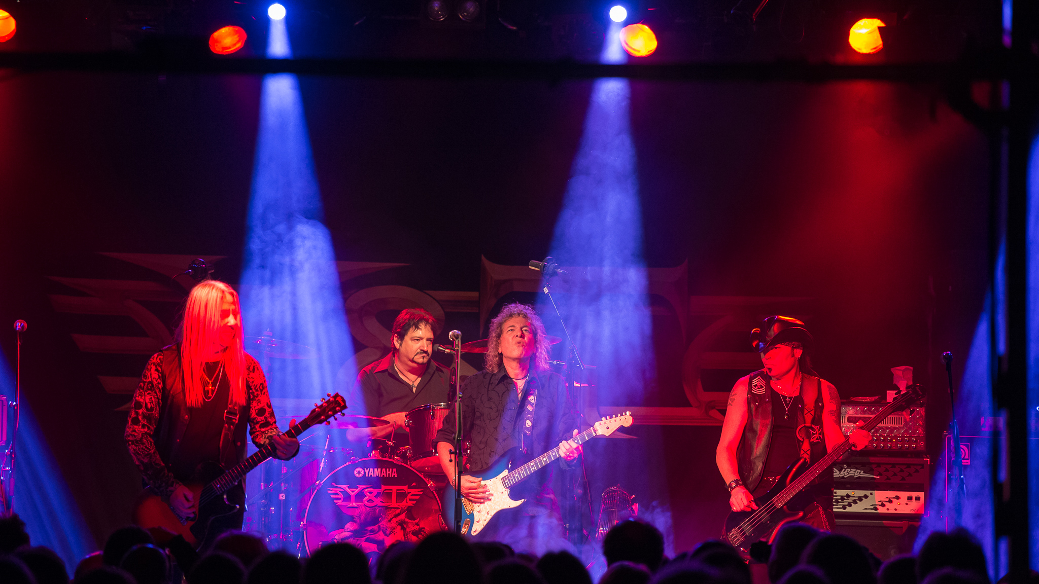 Aaron Leigh,Concertbüro Franken,Dave Meniketti,Der Hirsch,John Nyman,Konzert,Livekonzert,Livemusik,Mike Vanderhule,Musik,Y&T